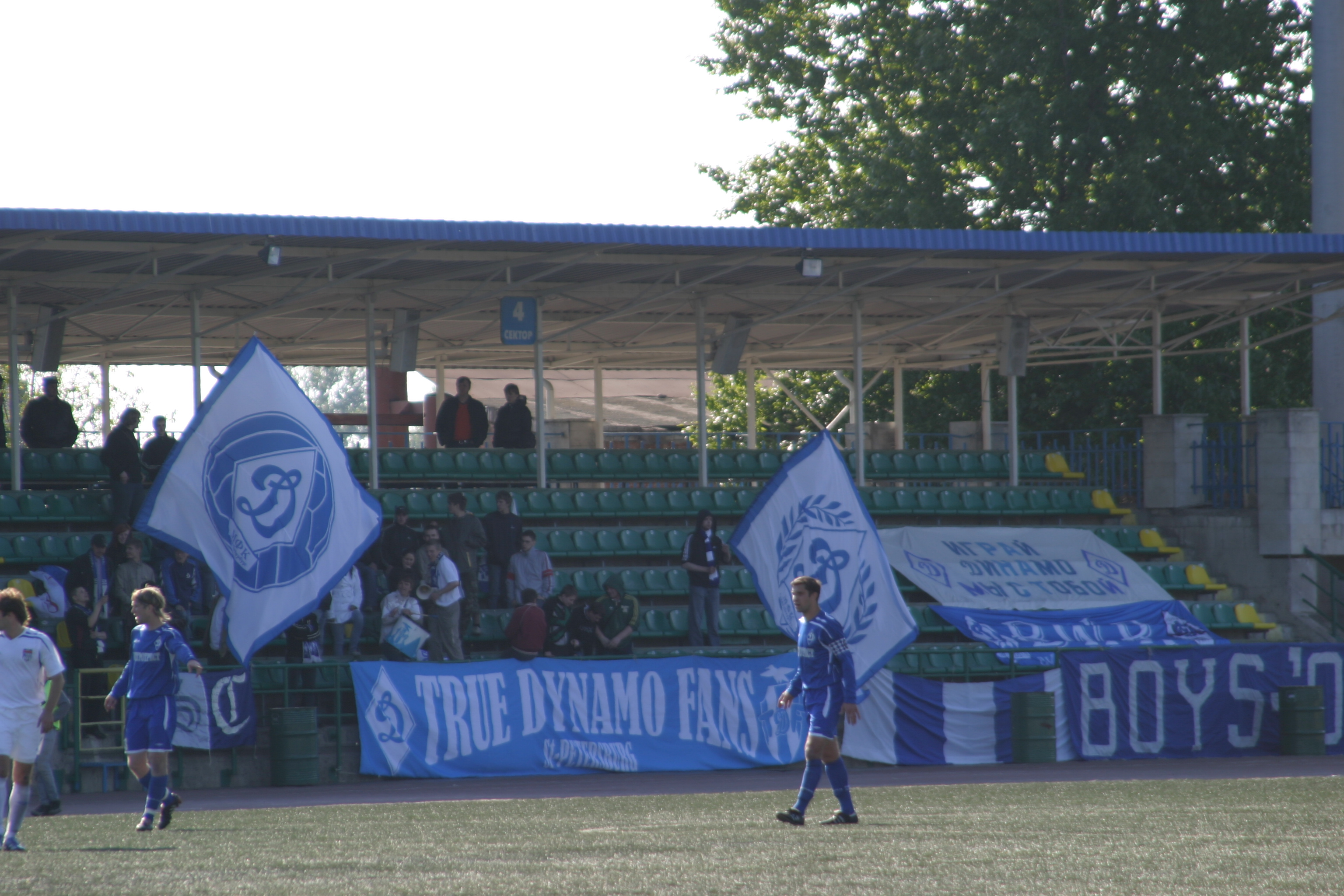 Матч Динамо Санкт-Петербург